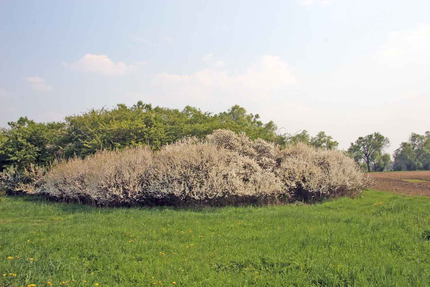 Prunus spinosa autor:Prazak